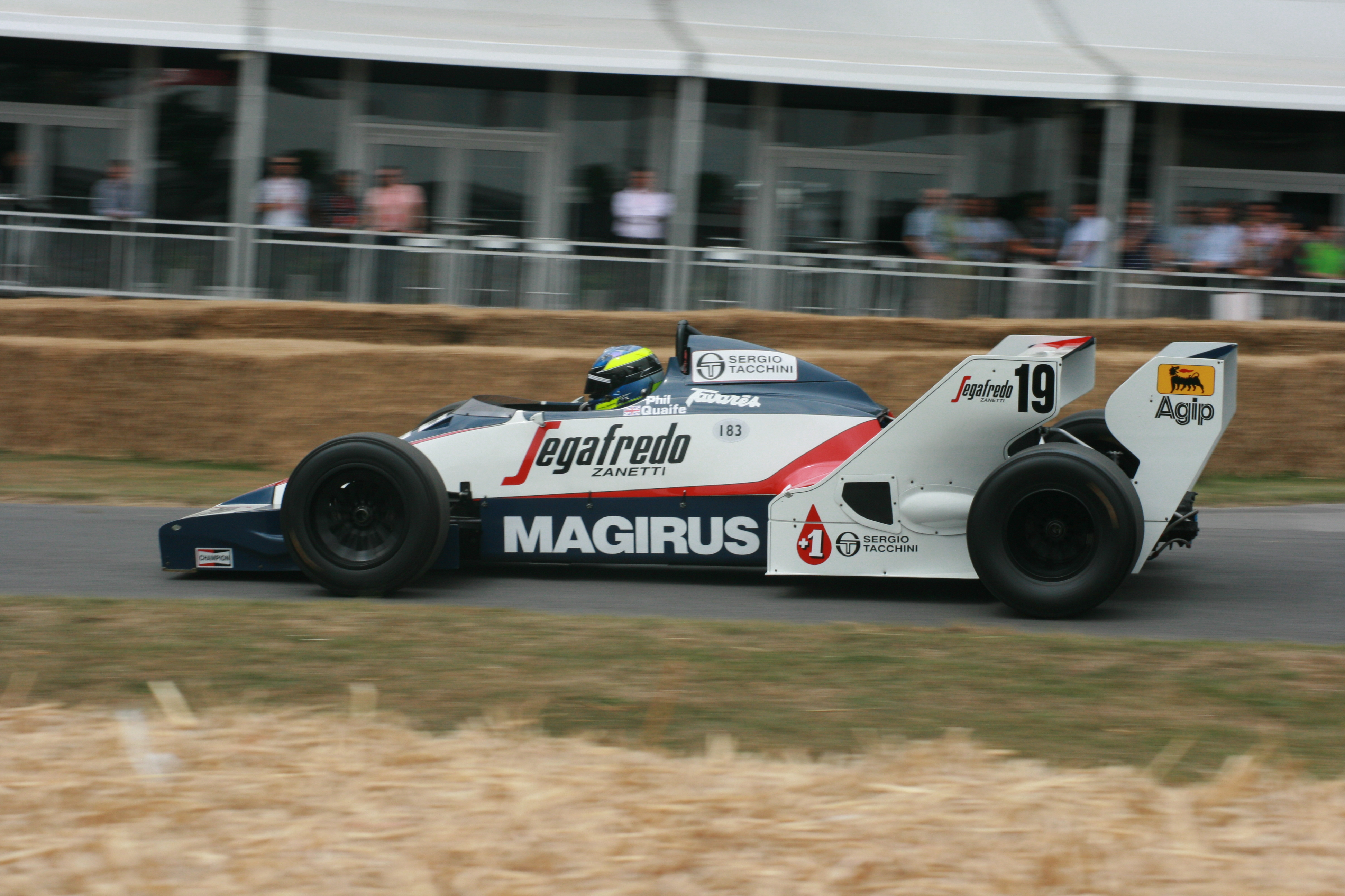 Built 1983